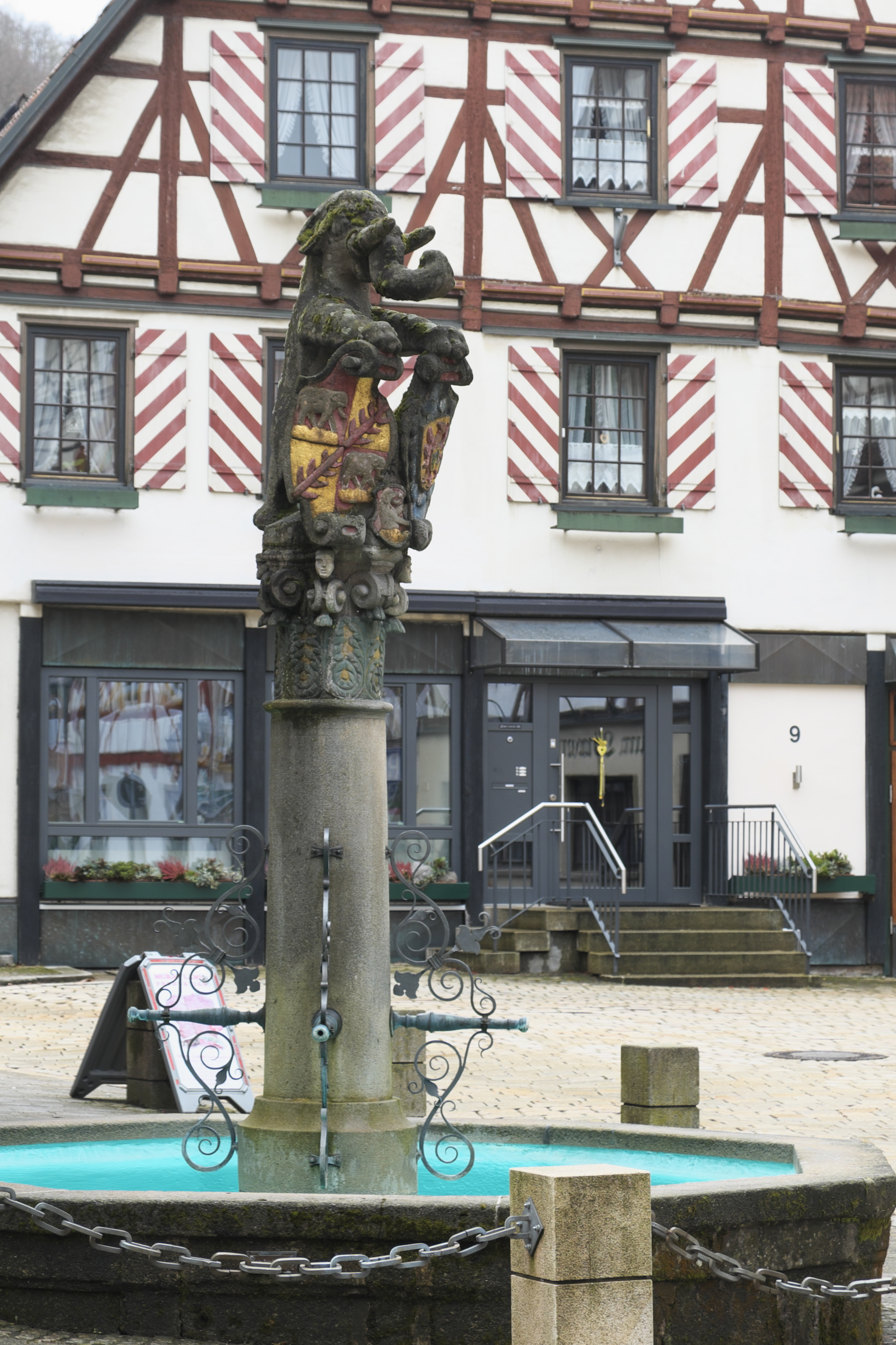 Elephantenbrunnen in Wiesensteig im Landkreis Göppingen (Baden-Württemberg/Deutschland)